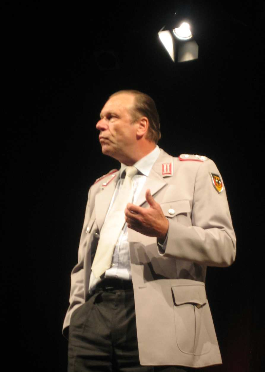 Sujet: Den däitsche Kabarettist Georg Schramm, an der Roll vum "Oberstleitnant Sanftleben". Auteur: Selwer gemaach vum user:zinneke, Juni, 2007 Lizenz: GNU-FDL